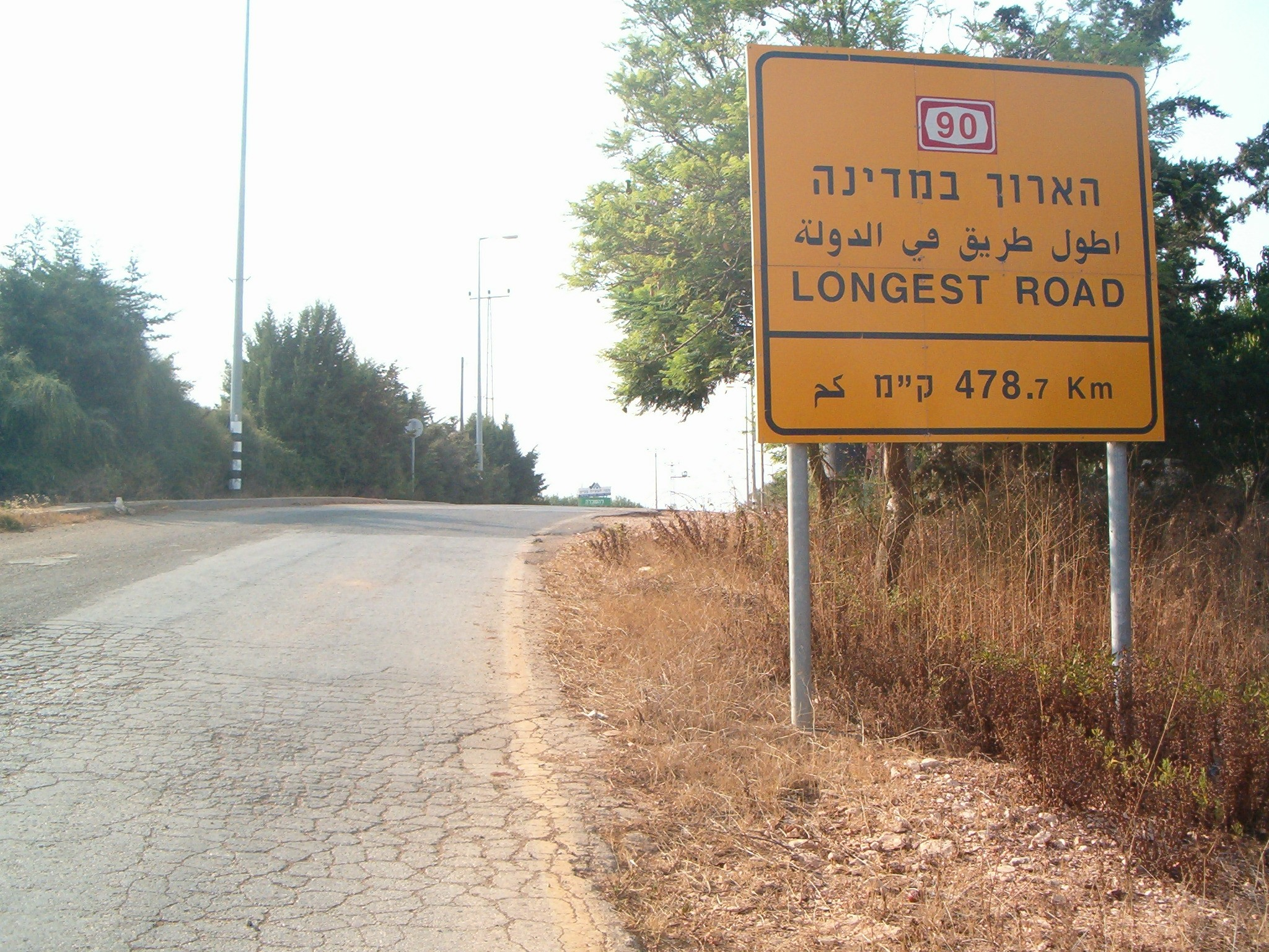 שלט בקצה הצפוני של כביש 90: הכביש הארוך במדינה 478.7 ק"מ